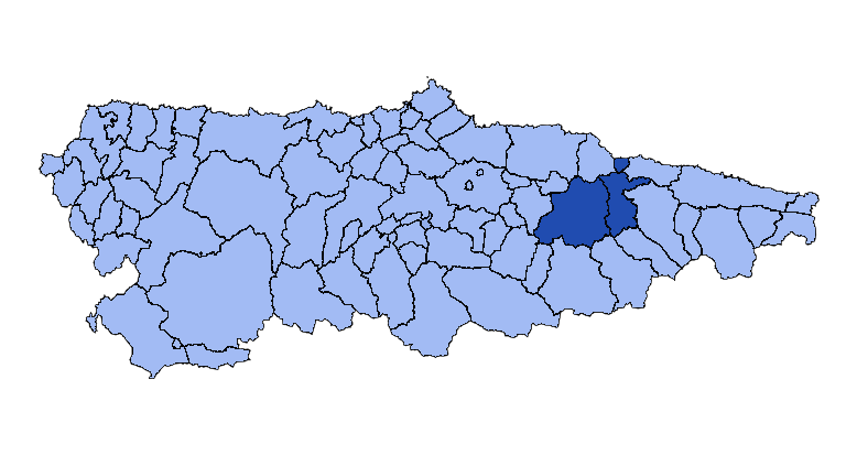 Concejos que forman la mancomunidad asturiana de la Comarca del Sueve